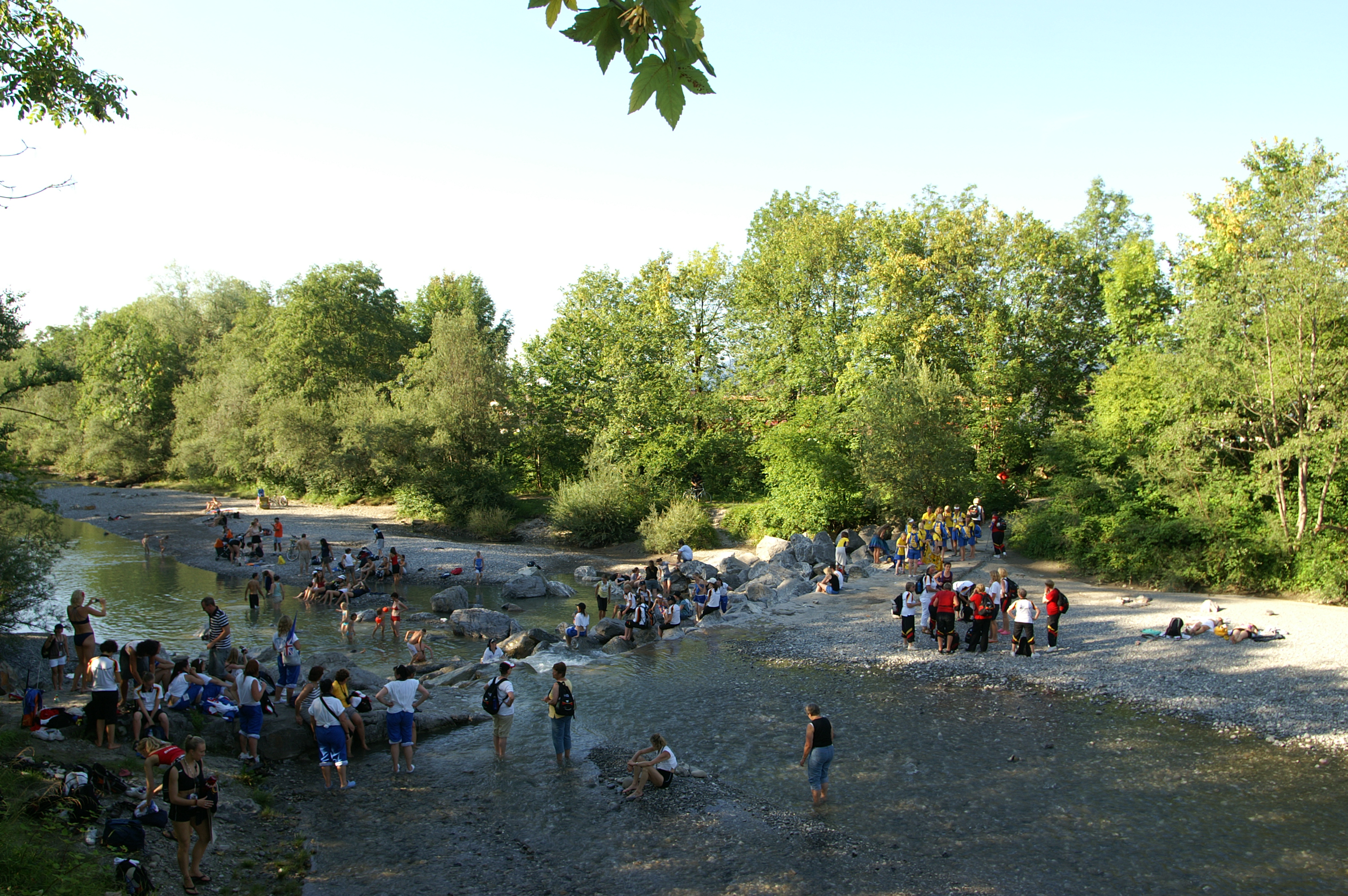 Dornbirn, Stadion Birkenwiese – Abschlussfeier der Weltgymnaestrada 2007. Neben dem Stadion eine Abkühlung in der Dornbirner Ach